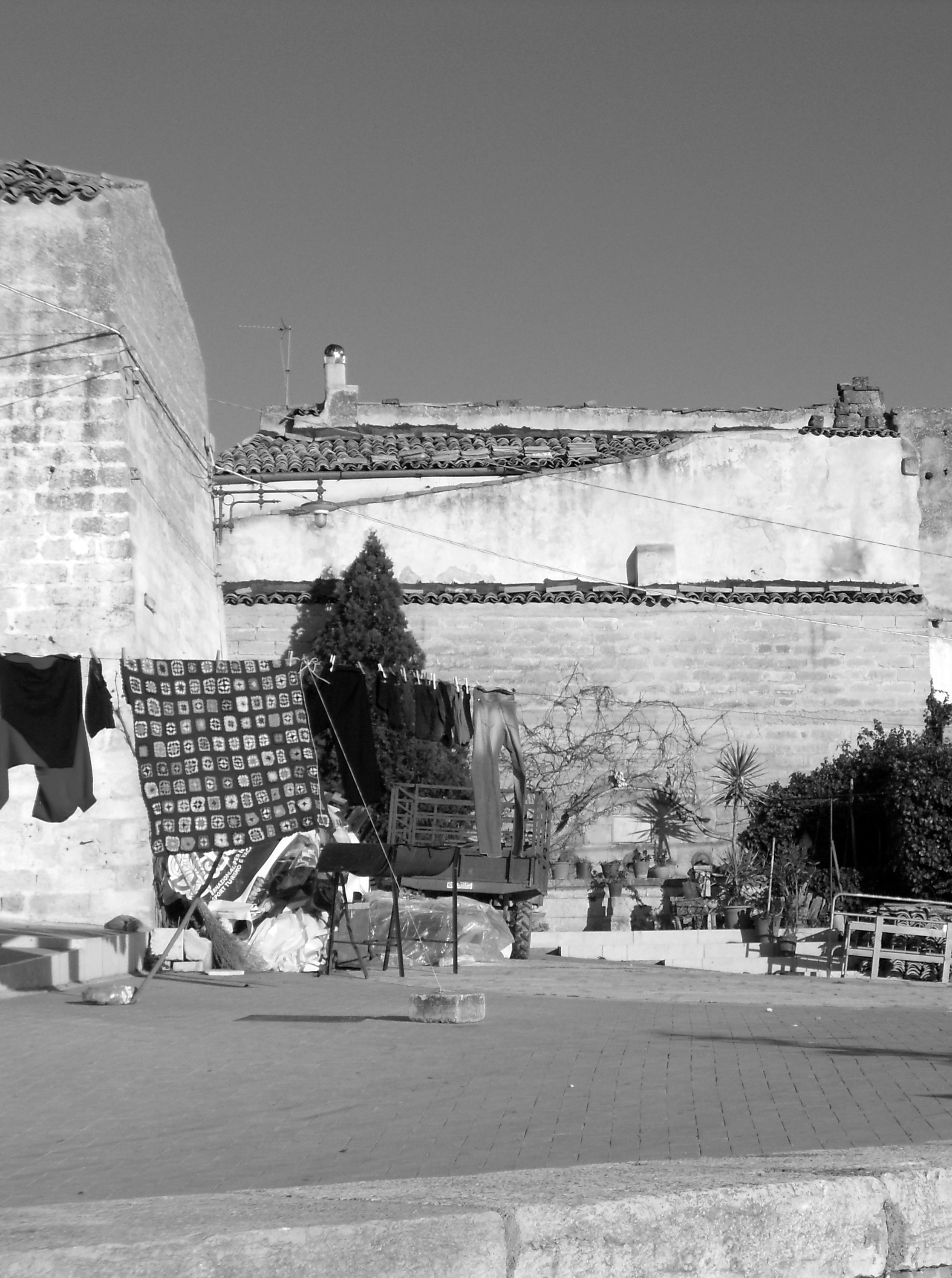 Particolare scorcio del Borgo Antico di Spinazzola BT.